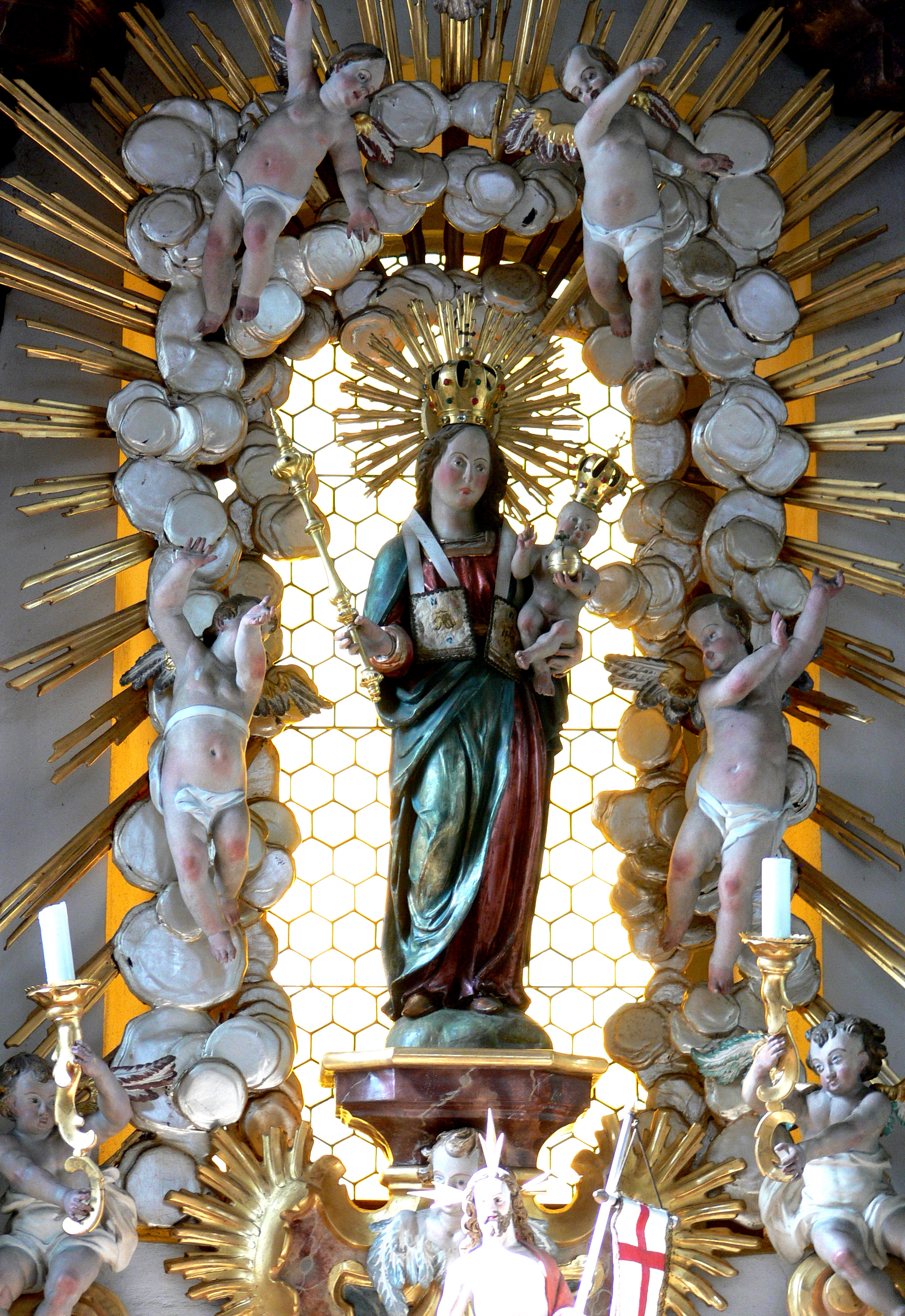 Wallfahrtskirche Maria zum Berge Karmel, Baitenhausen, Stadt Meersburg, Bodenseekreis Hochaltar eines unbekannten Meisters, 1762; gefasst von Franz Joseph Guldin (Markdorf) 1763: Gnadenbild (Madonna mit Kind) des 14. Jh.